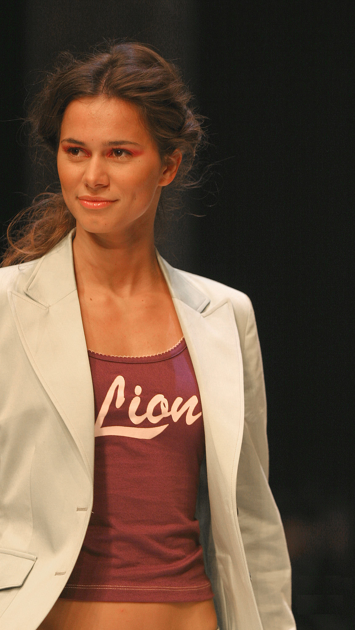 Summer 2005, Cláudia Vieira in Porto, Portugal